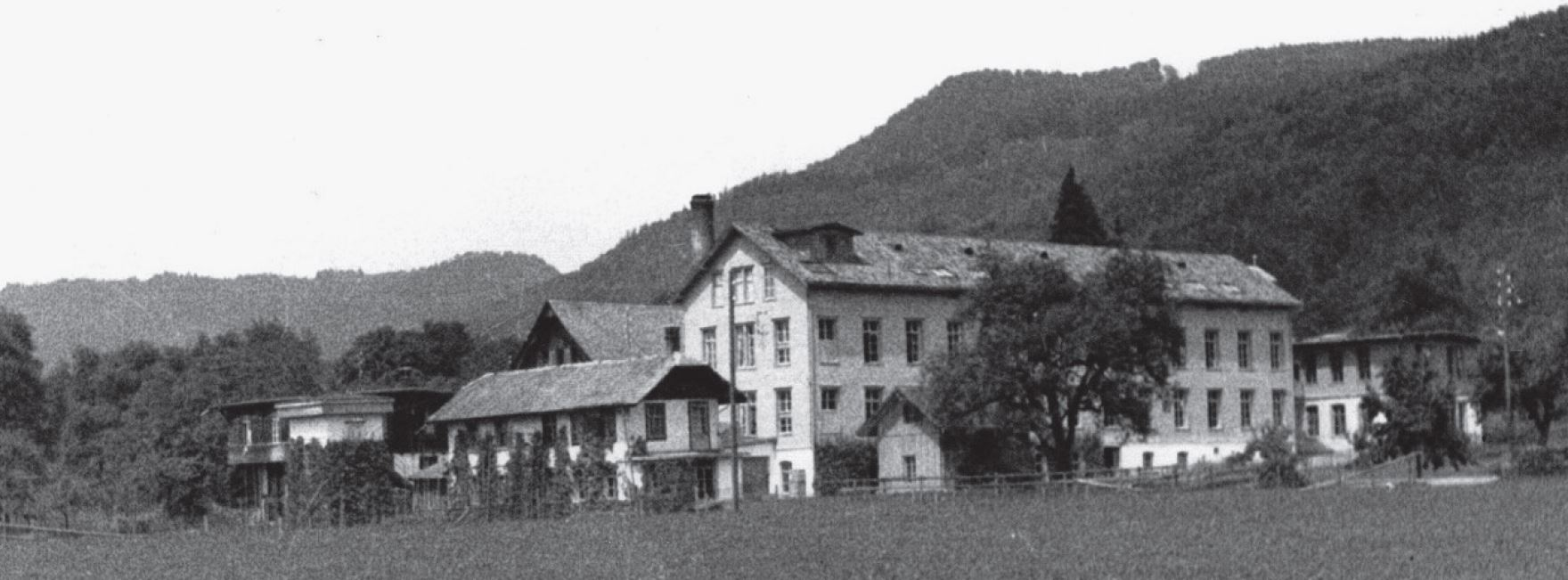 Weisbrod-Zürrer AG, Hausen am Albis ZH, Schweiz, 1892